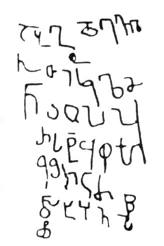 დავათის სტელის წარწერა